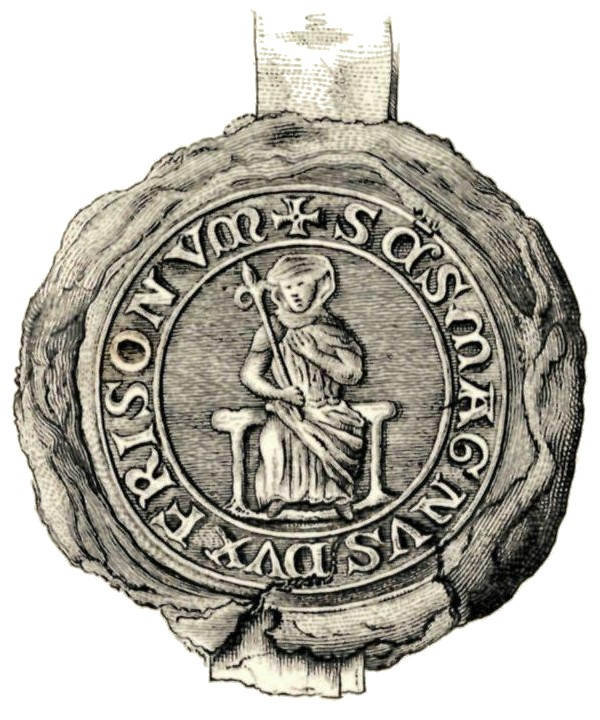 Hillige(?) Magnus, liedsman fan de Friezen (1270)